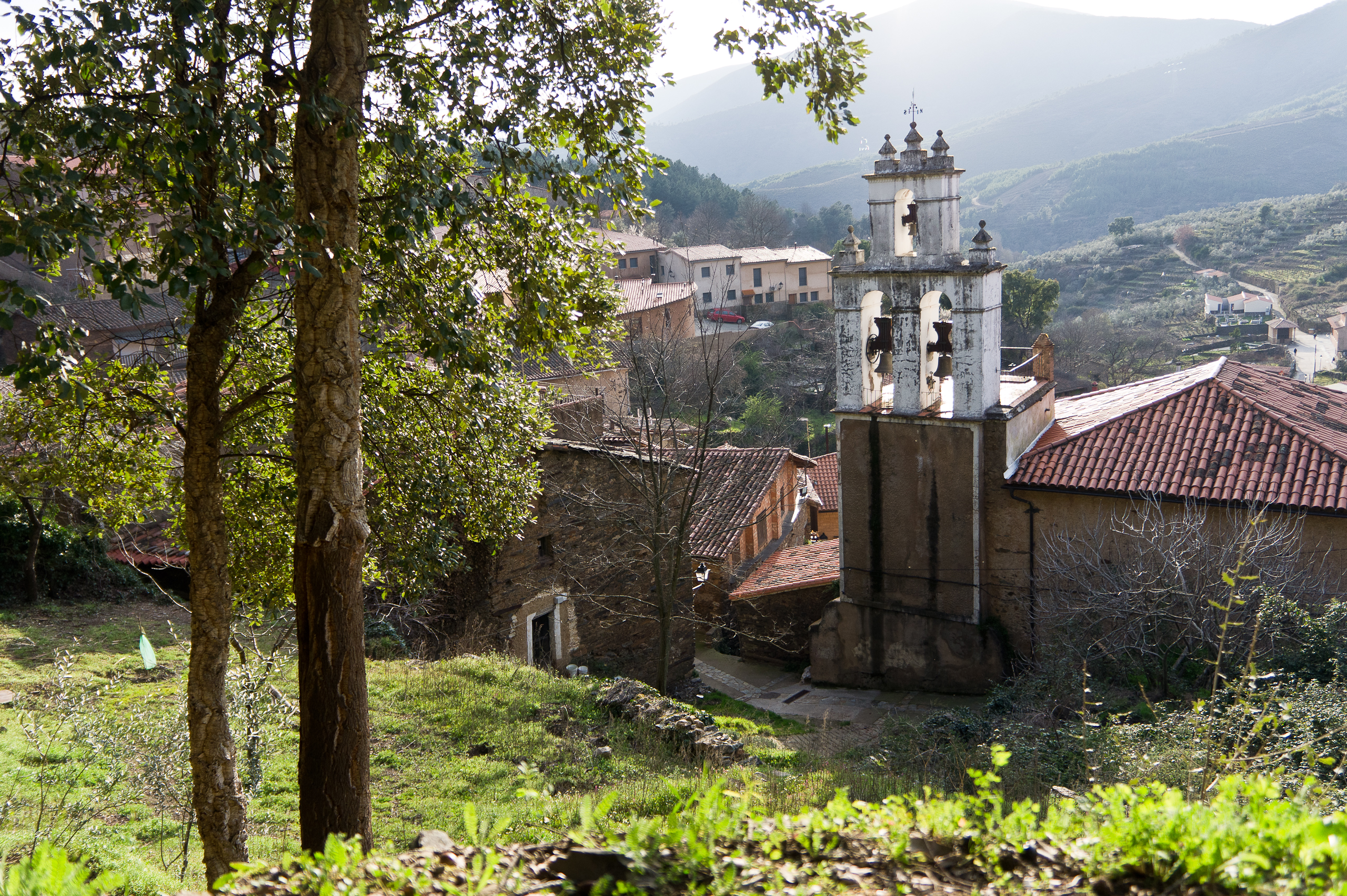 Iglesia parroquial católica dedicada a Nuestra Señora de la Asunción